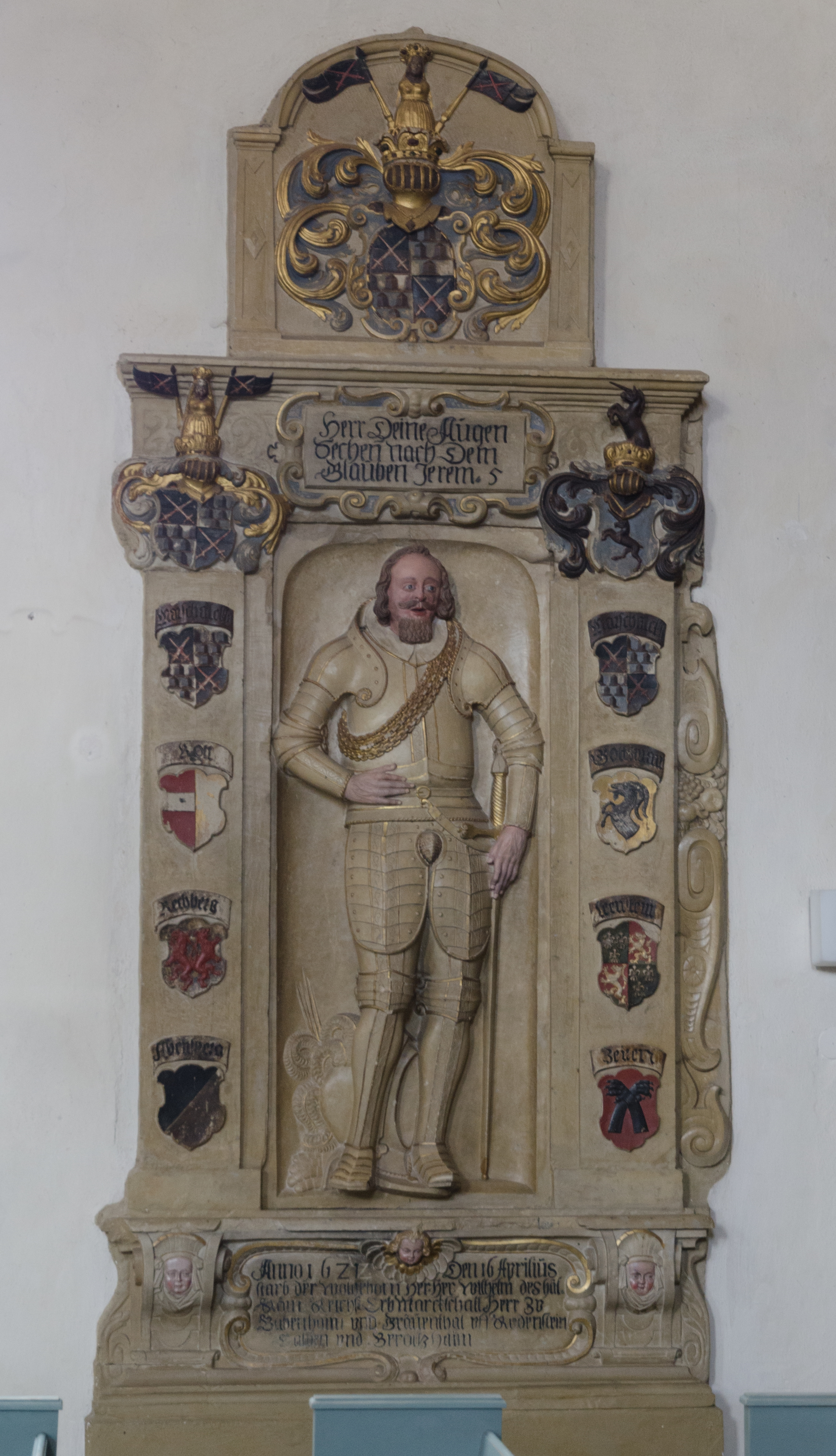 Pappenheim, Ev. Stadtpfarrkirche, Epitaph Wilhelm von Pappenheim († 16. April 1621) mit Wappen Pappenheim (oben) und Ahnenwappen Pappenheim, Pappenheim, Rodt, Rechberg, Abensberg sowie Wallenfels, Pappenheim, Gotsmann, Leeukem(?), Zeyern